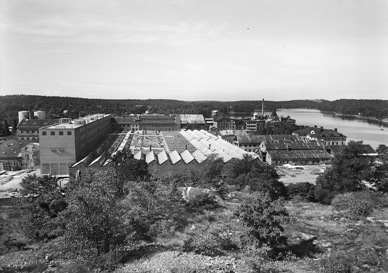 Gustavsbergs porslinsfabrik Exteriör